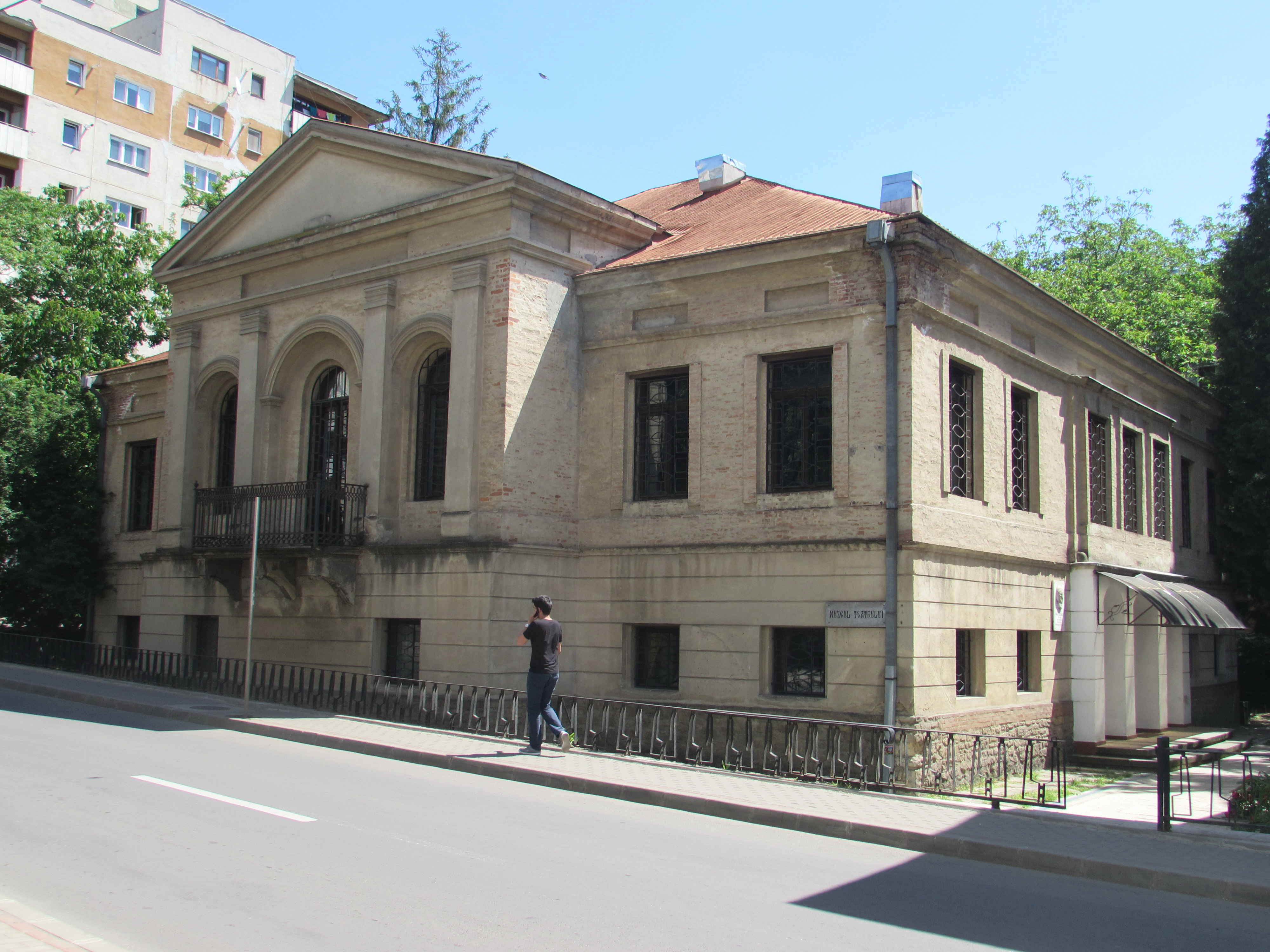 Casa vornicului Vasile Alecsandri din Iași, fostul muzeu al teatrului. Clădire construită în 1810.